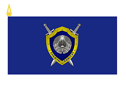 Флаг Следственного комитета Республики Беларусь